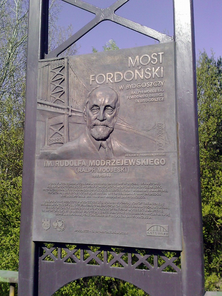 Pamiątkowa tablica przy Moście Fordońskim w Bydgoszczy im. Rudolfa Modrzejewskiego.